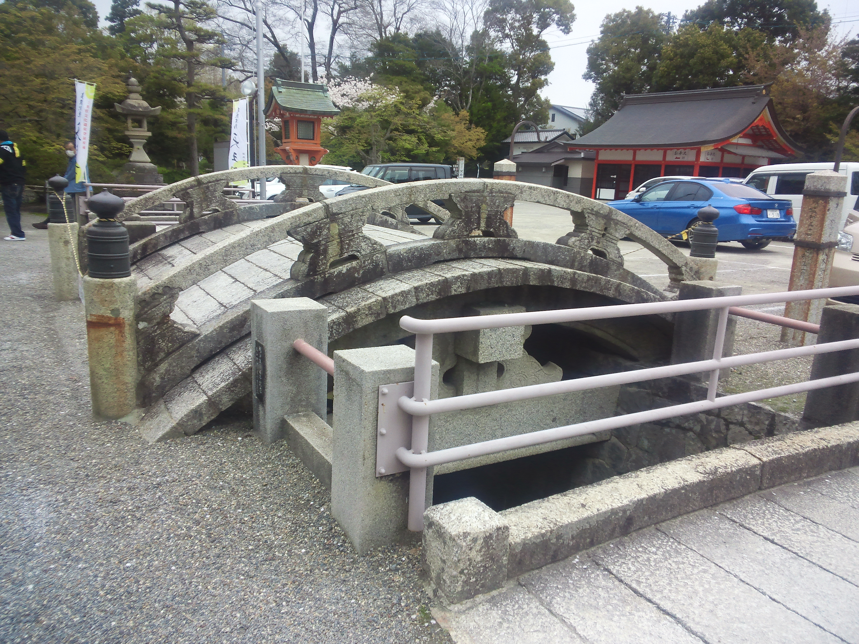 津島神社 - 石橋